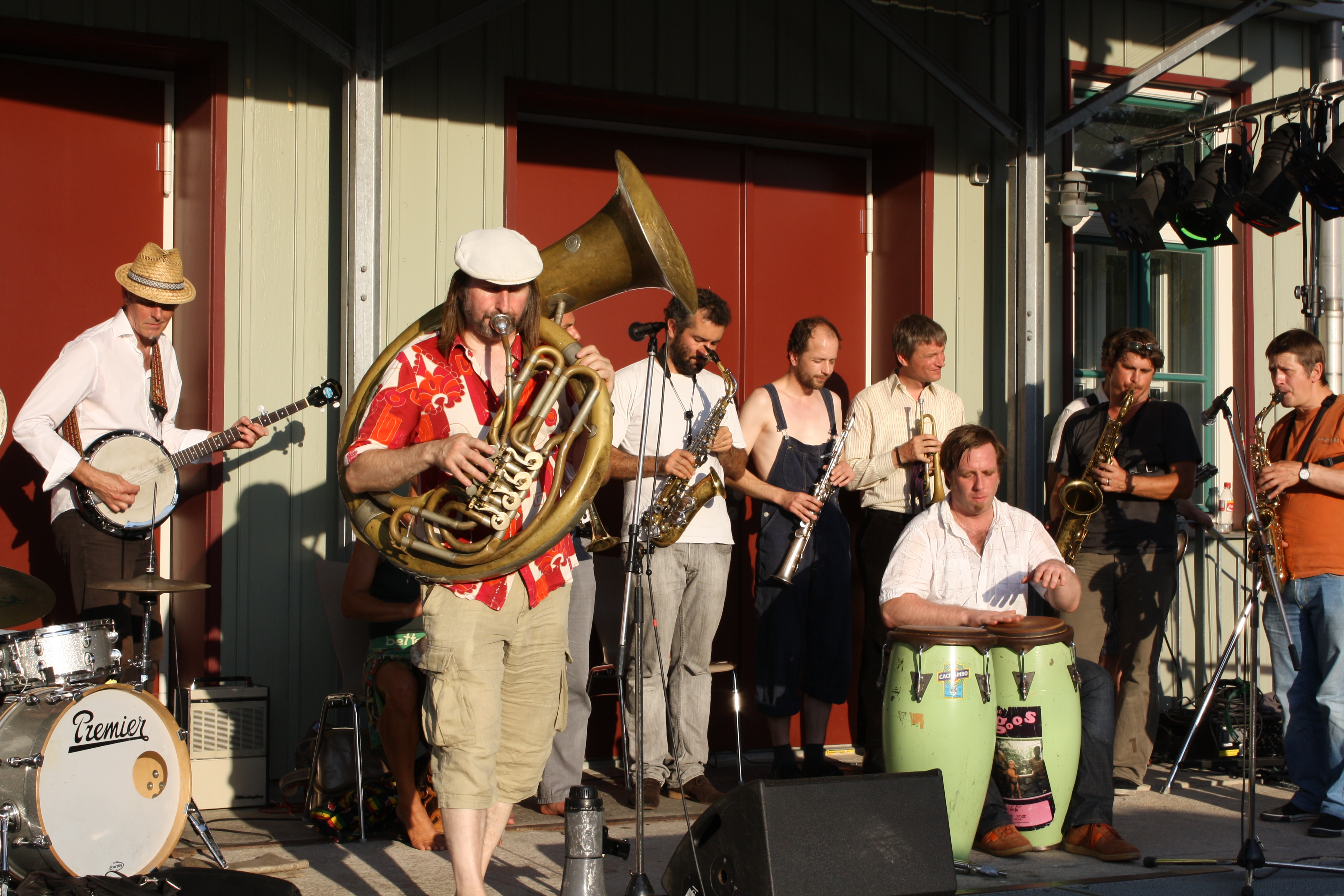 Express Brass Band im Giesinger Bahnhof